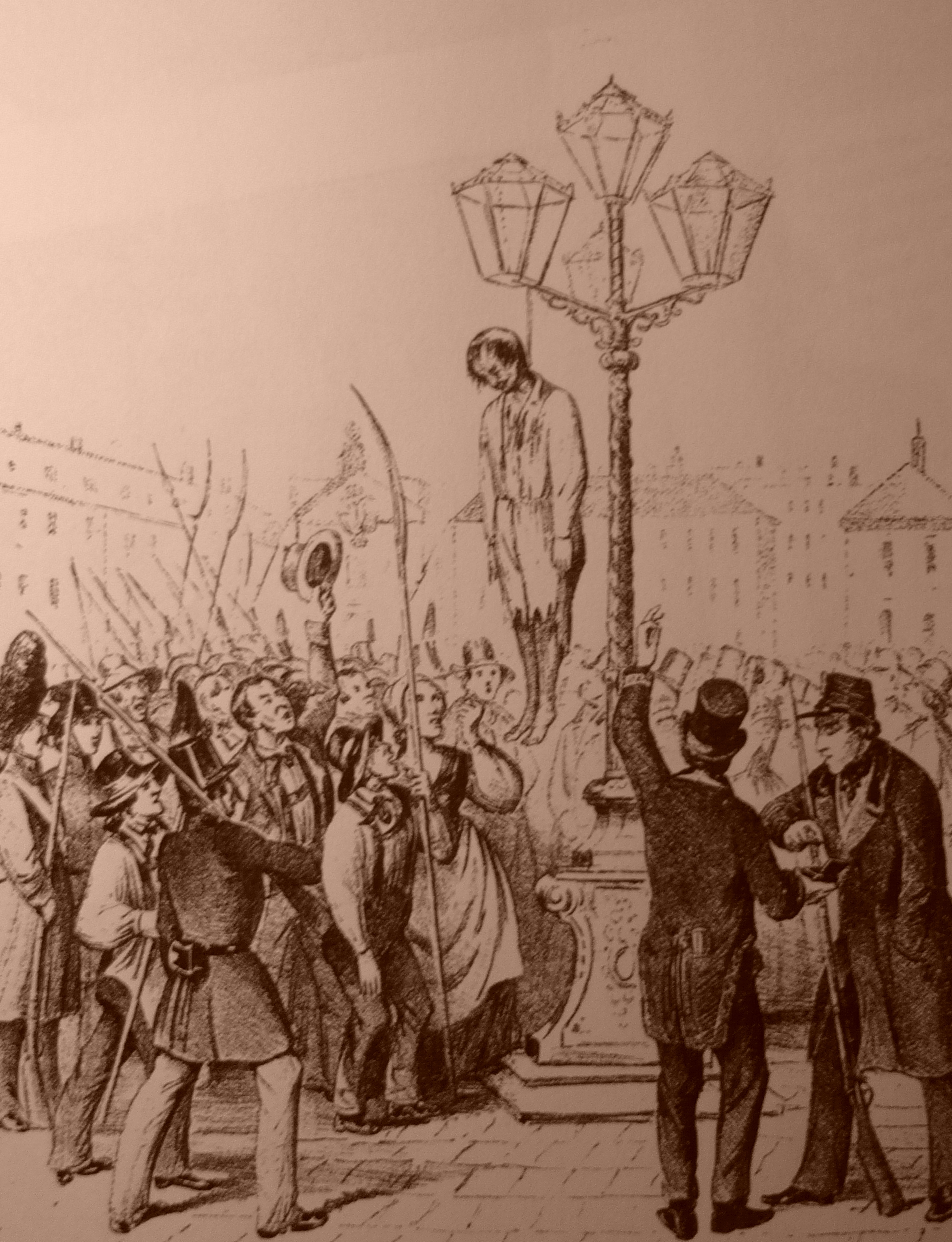 Theodor Baillet de Latour akasztása Bécsben, 1848. október 6-án